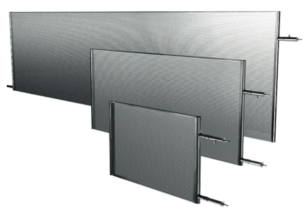 Tre tipologie di scambiatori di calore a microcanali